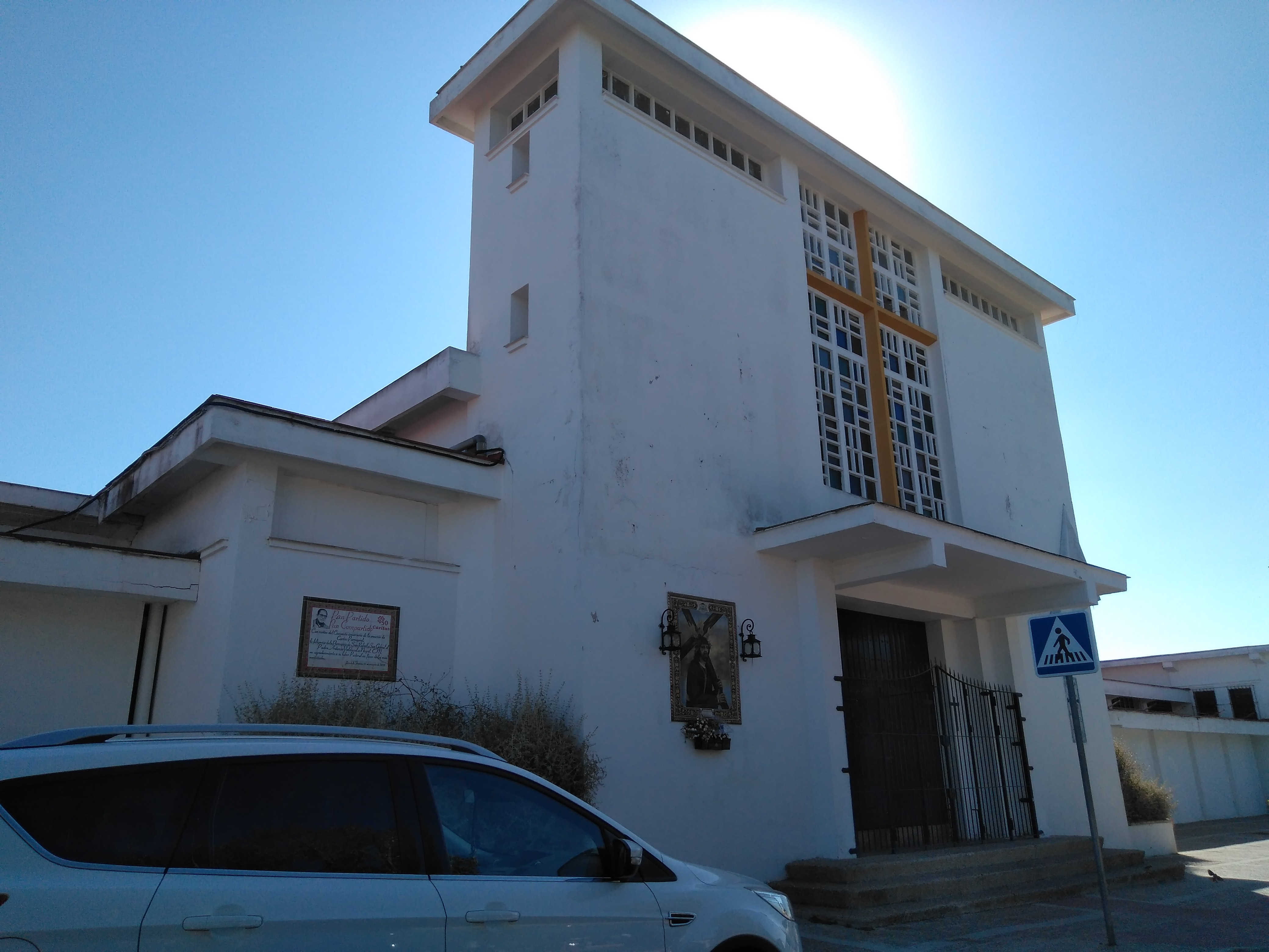 Parroquia de San Rafael, Jerez de la Frontera (Andalucía, España)